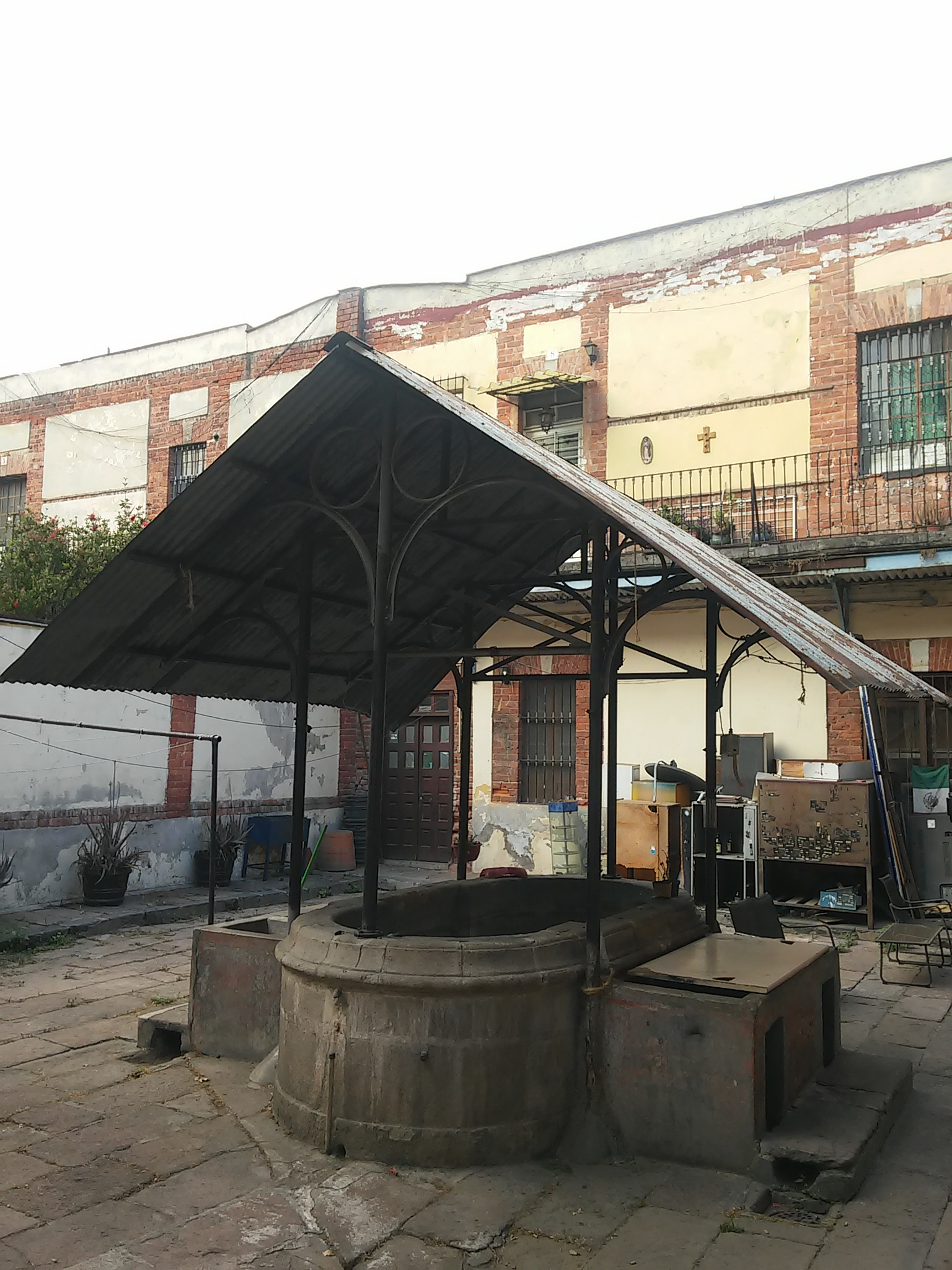 Lavaderos ubicados en el patio de la vecindad de Echeveste 2, centro histórico de la Ciudad de México